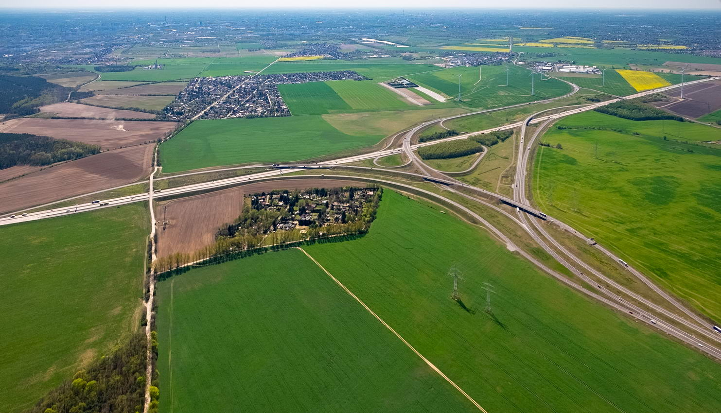 Bernauer Schleife